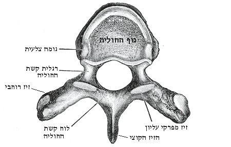 חוליה חזית אופיינית במבט על